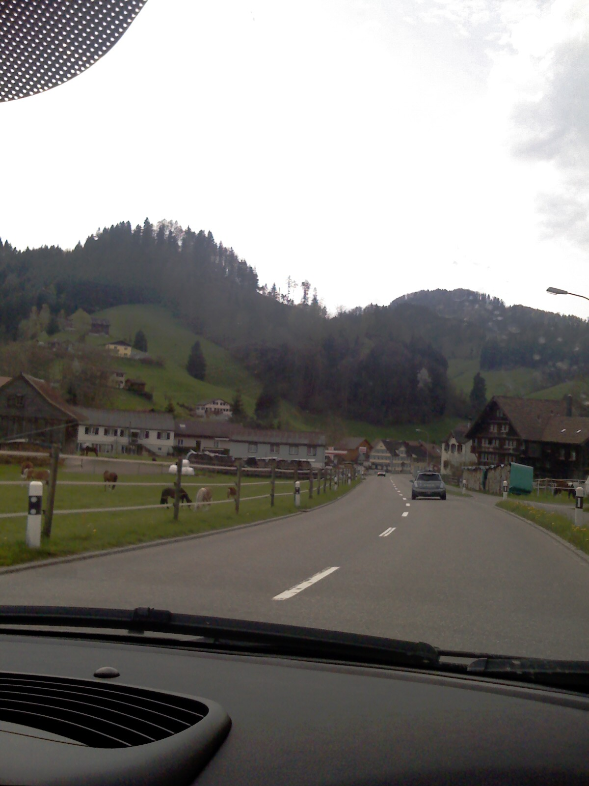 Mogelsberg (Furth), Toggenburg, Switzerland - Mogelsberg en Togenburgo (Furth), Svislando